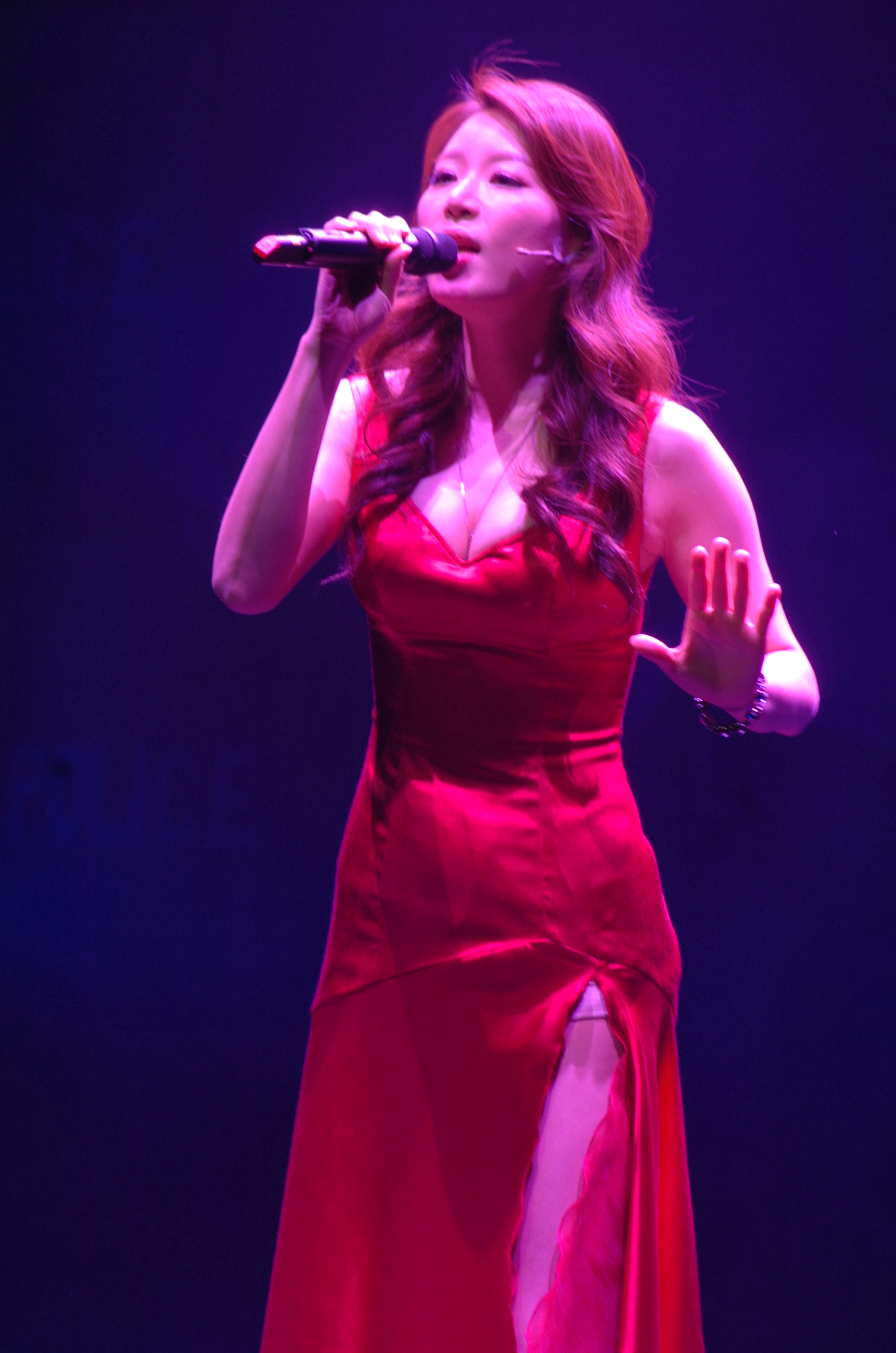 광화문연가 프레스콜